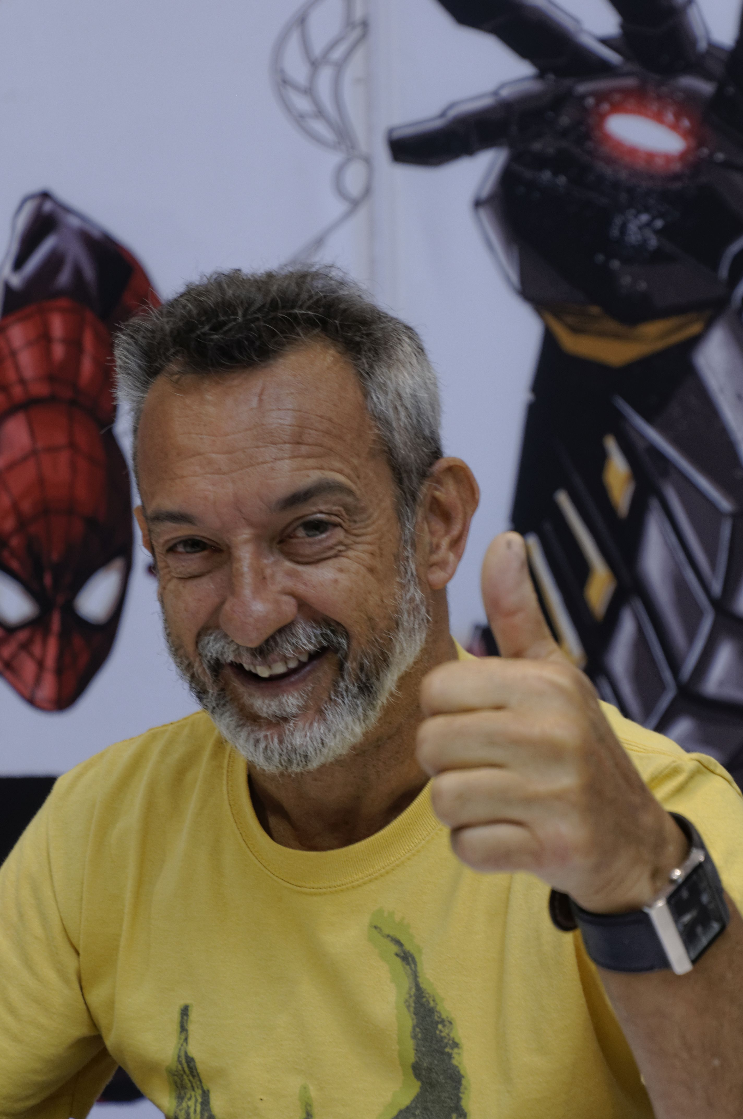 Bilder von der Comic Con Germany 2019 in Stuttgart